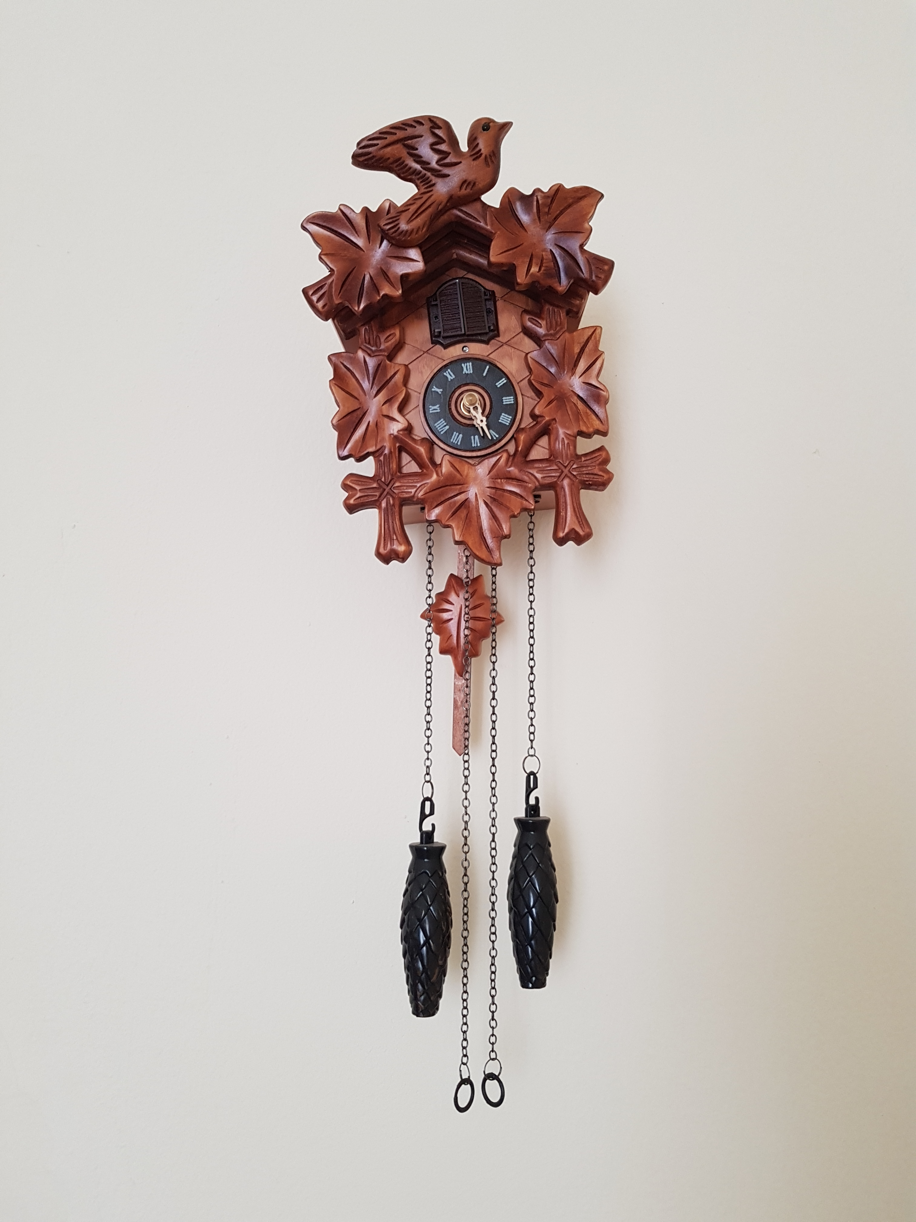 ساعة حائطية مصنوعة من الخشب